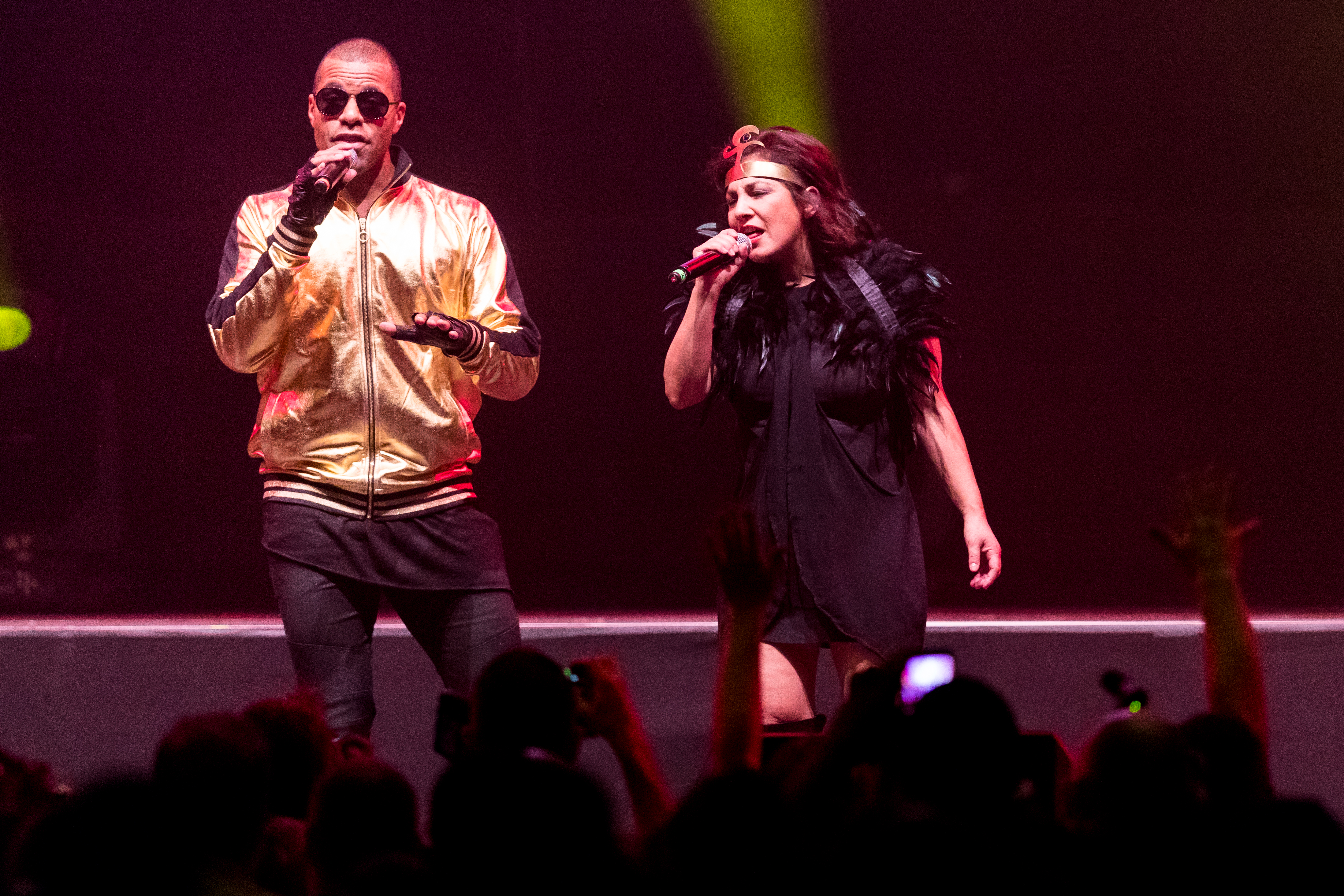 Pharao during Sunshine Live - Die 90er Live on Stage at Maimarkthalle & Maimarktclub, Mannheim, Baden-Württemberg, Germany on 2017-11-25, Photo: Sven Mandel